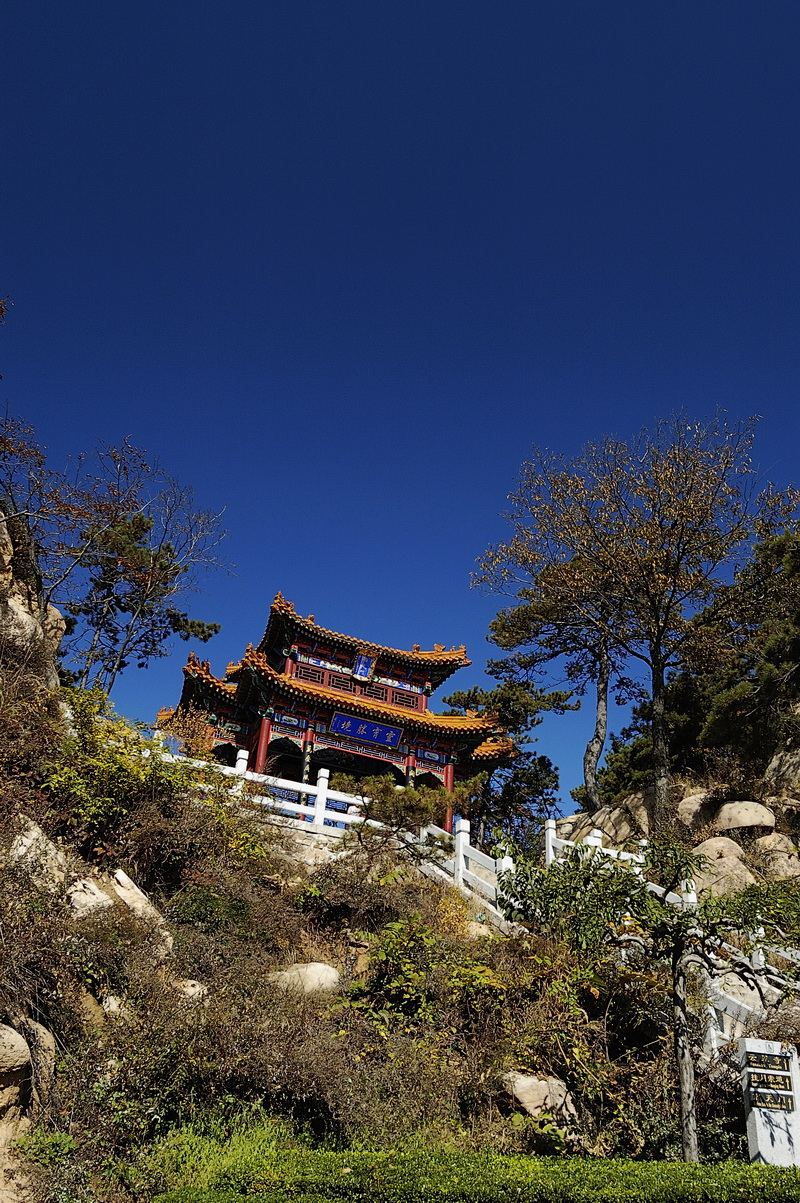 很蓝的天，真是难得。 奥运后太多的蓝天白云，有些视觉疲劳，不过将就一下吧：） Panshan mountain,Tianjin China